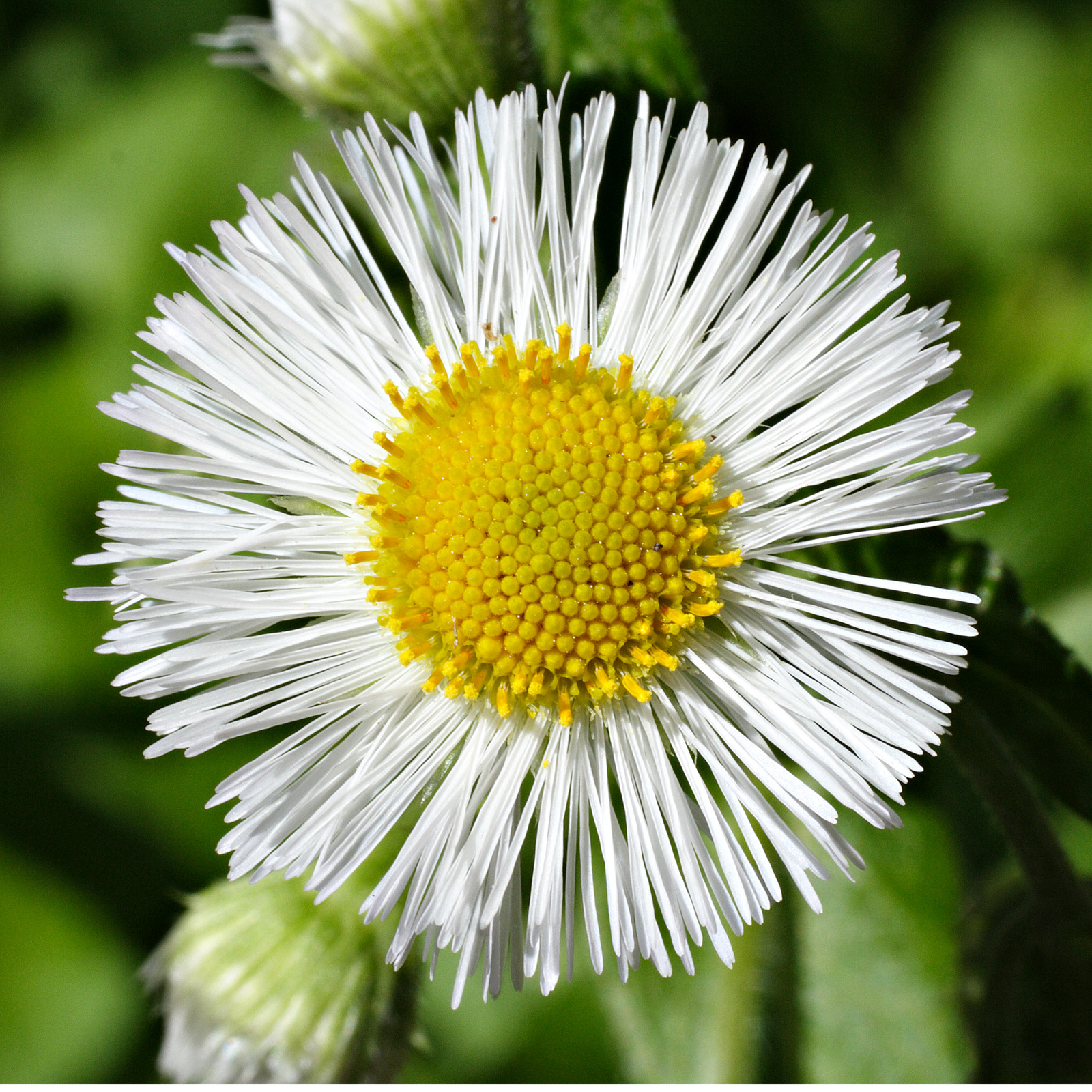 Erigeron annuus flower